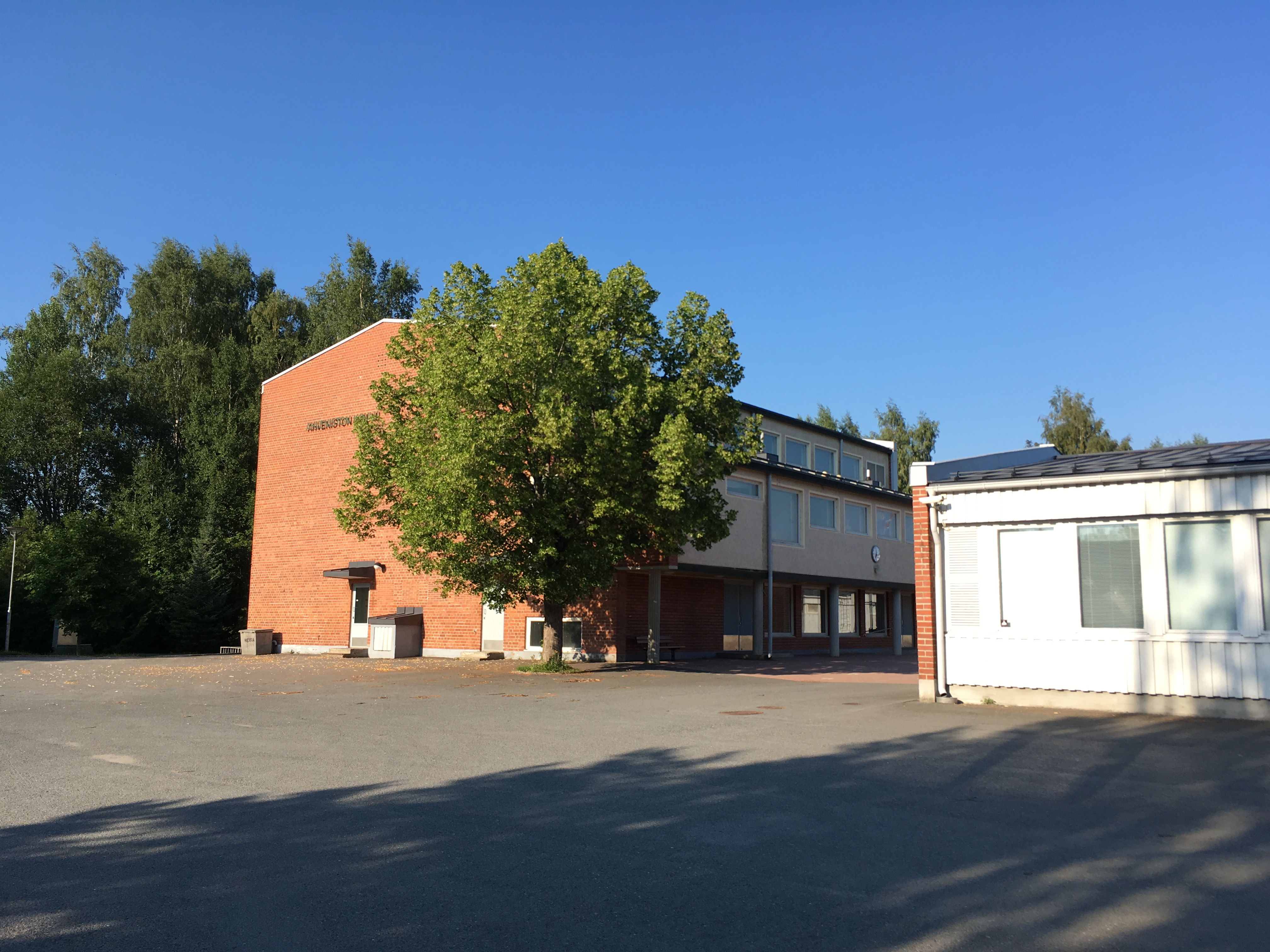 Ahveniston koulun liikuntarakennus (vasemmalla) ja päärakennus (oikealla)